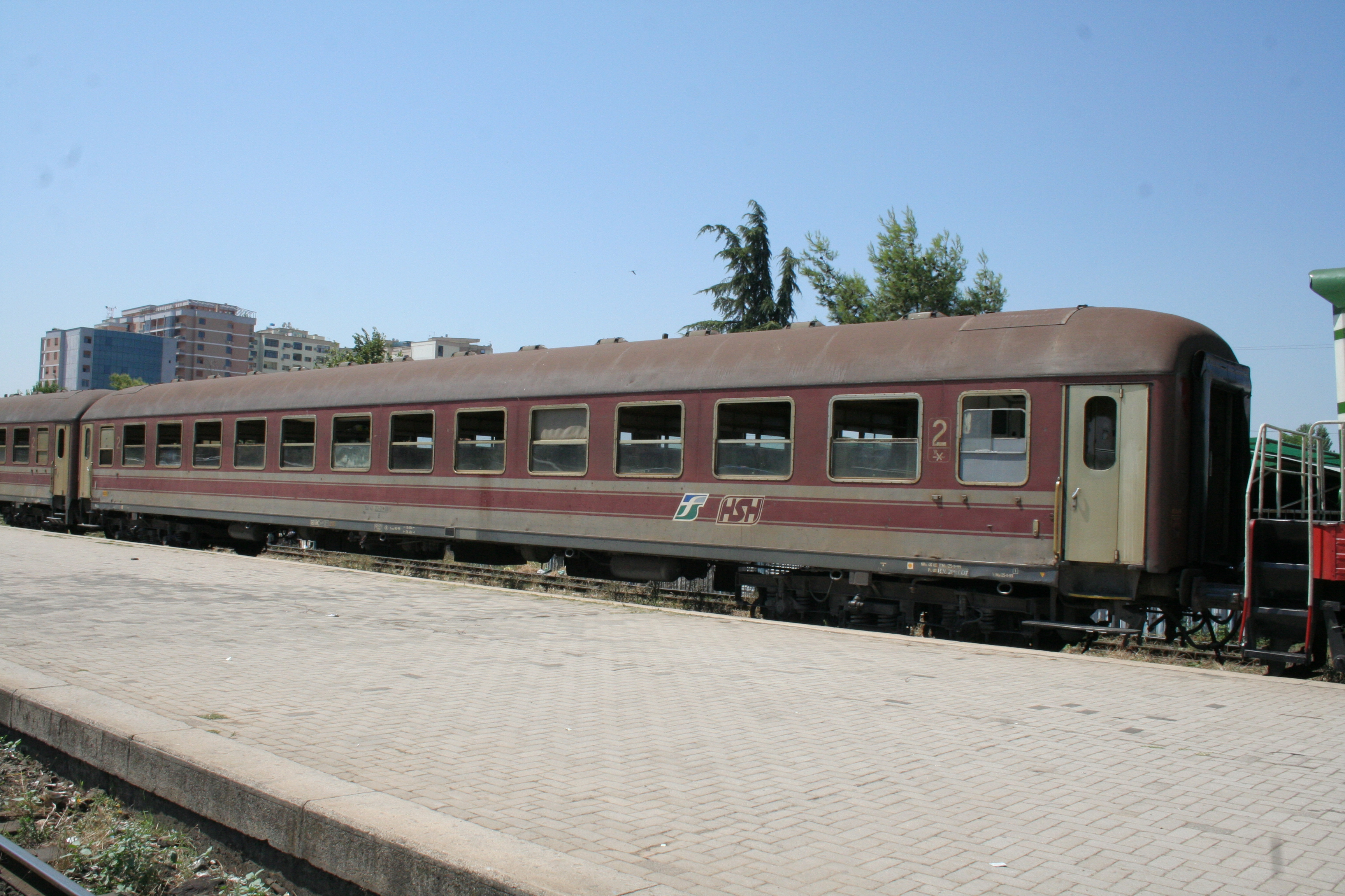 Een voormalige Italiaans rijtuig in dienst van de Albanese spoorwegen.